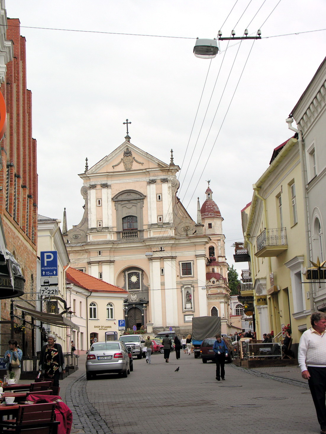 Vilnius Vilniaus Šv. Teresės bažnyčia Foto: Algirdas, 2006 m. rugpjūčio 8 d., Lietuva